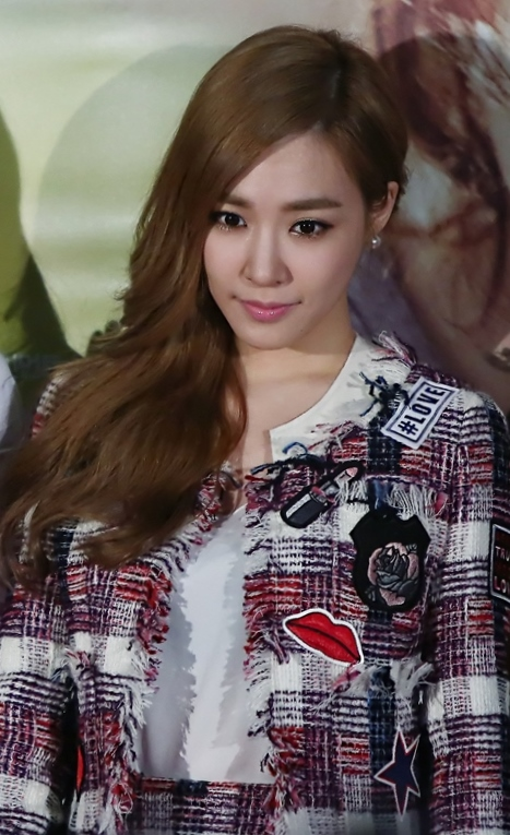 Tiffany Hwang at VIP premiere of film My Brilliant Life on August 28, 2014.